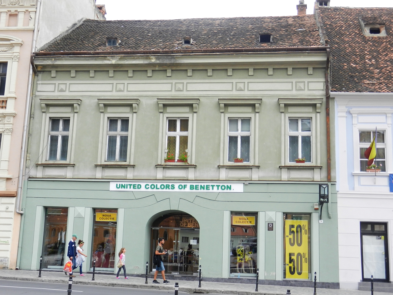 Casa monument istoric (Piata Sfatului 24)